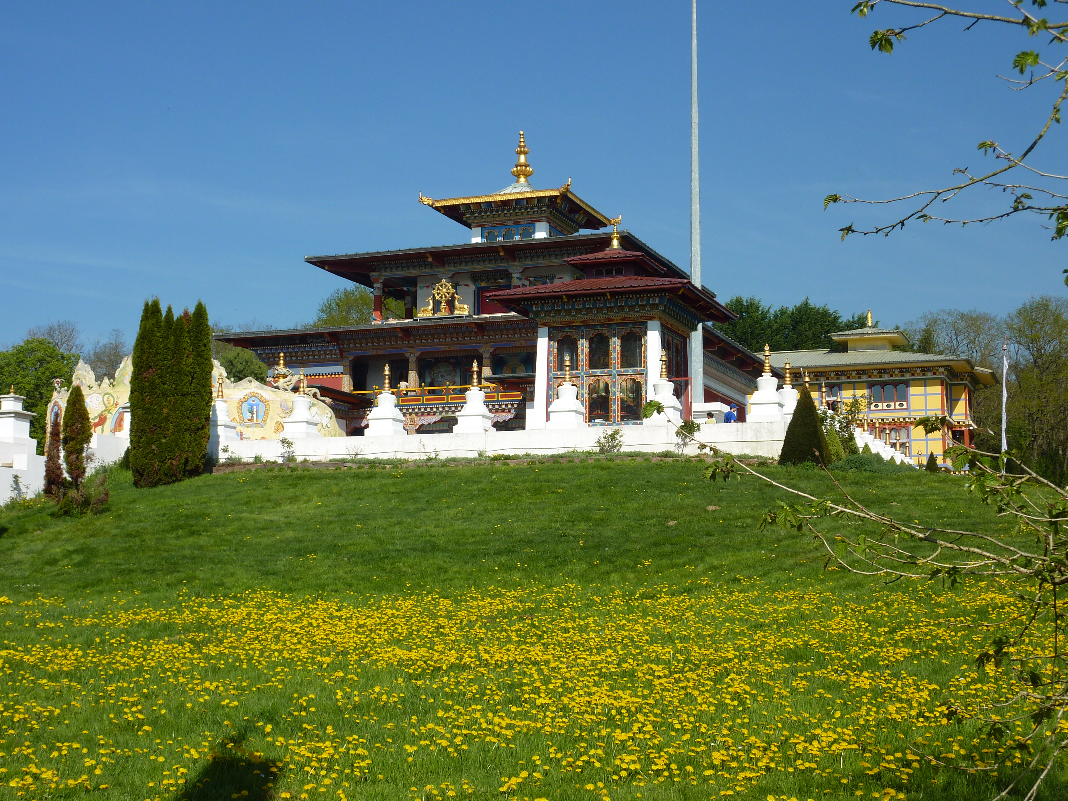 La Boulaye : temple tibétain des mille bouddhas Dashang Kagyu Ling